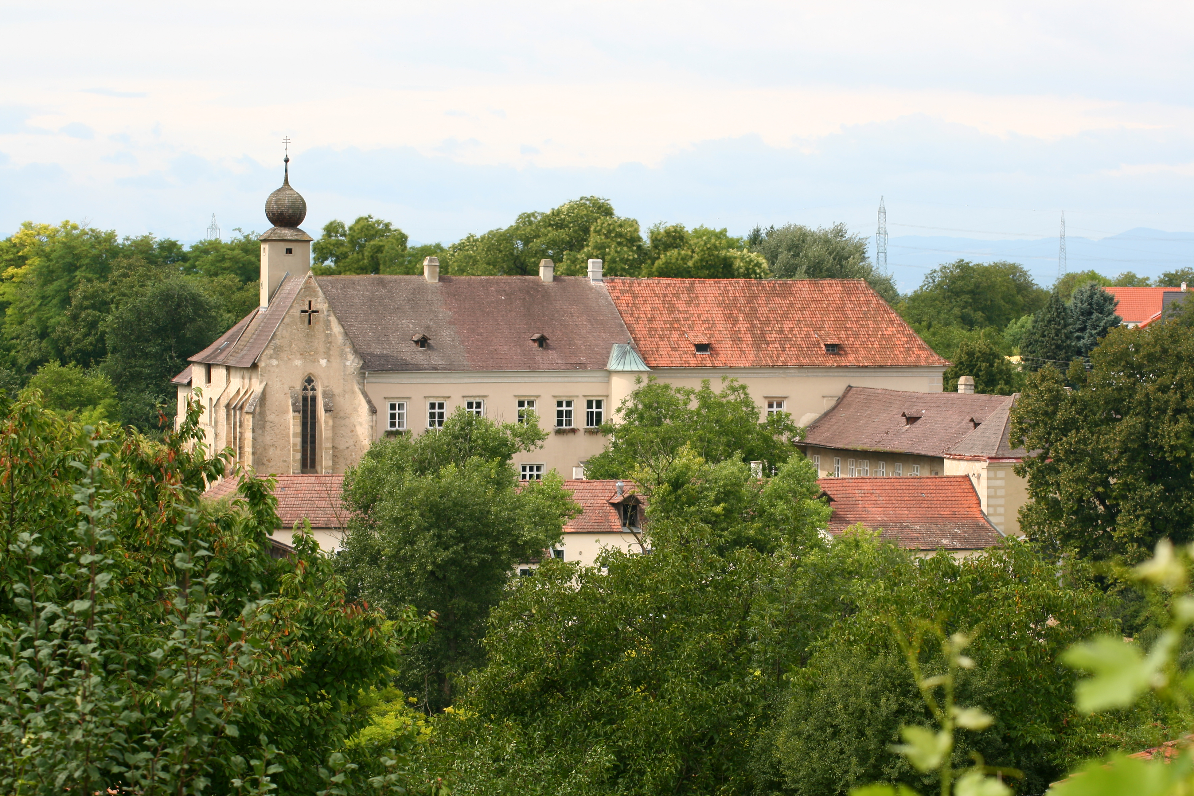 Schloss und Kapelle von der Hausbergkante aus gesehen, seit Sept.2010 repariertes Läutwerk am Uhrturm; Dachreiter mit Zwiebelhelm 16/17.Jh